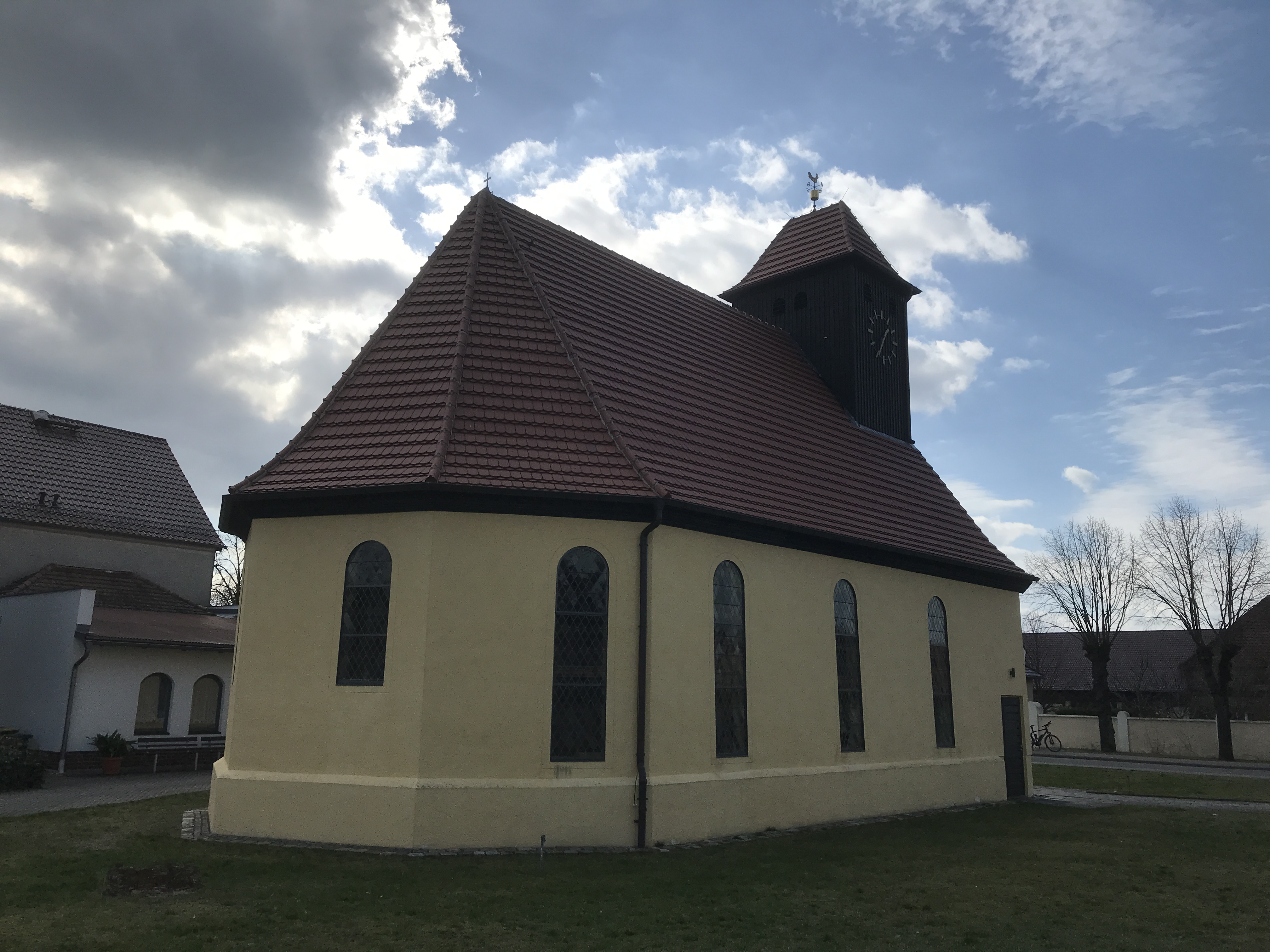 Die Dorfkirche Schönwalde der Gemeinde Schönwald im Landkreis Dahme-Spreewald entstand im Jahr 1686.